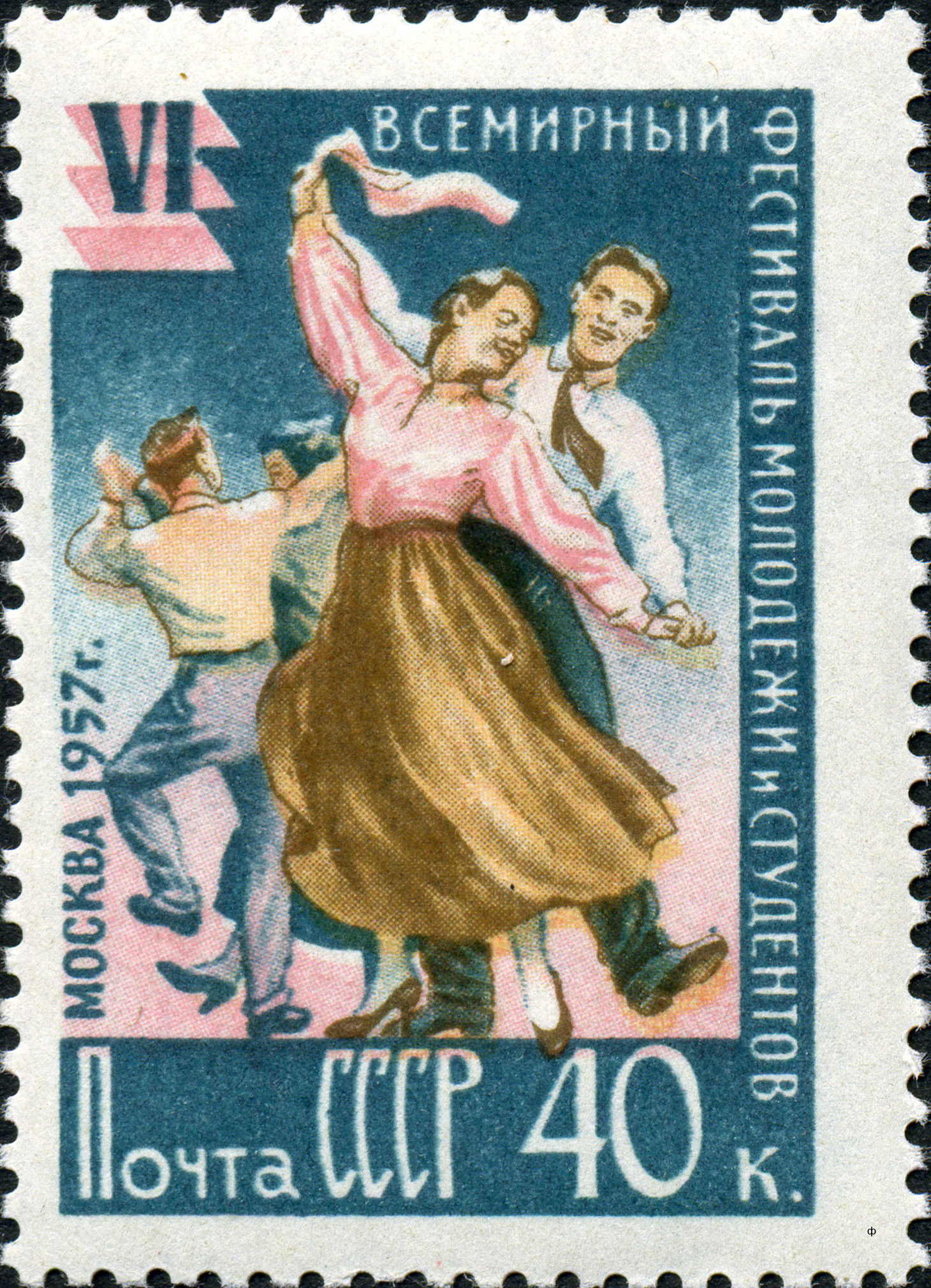 Марка СССР